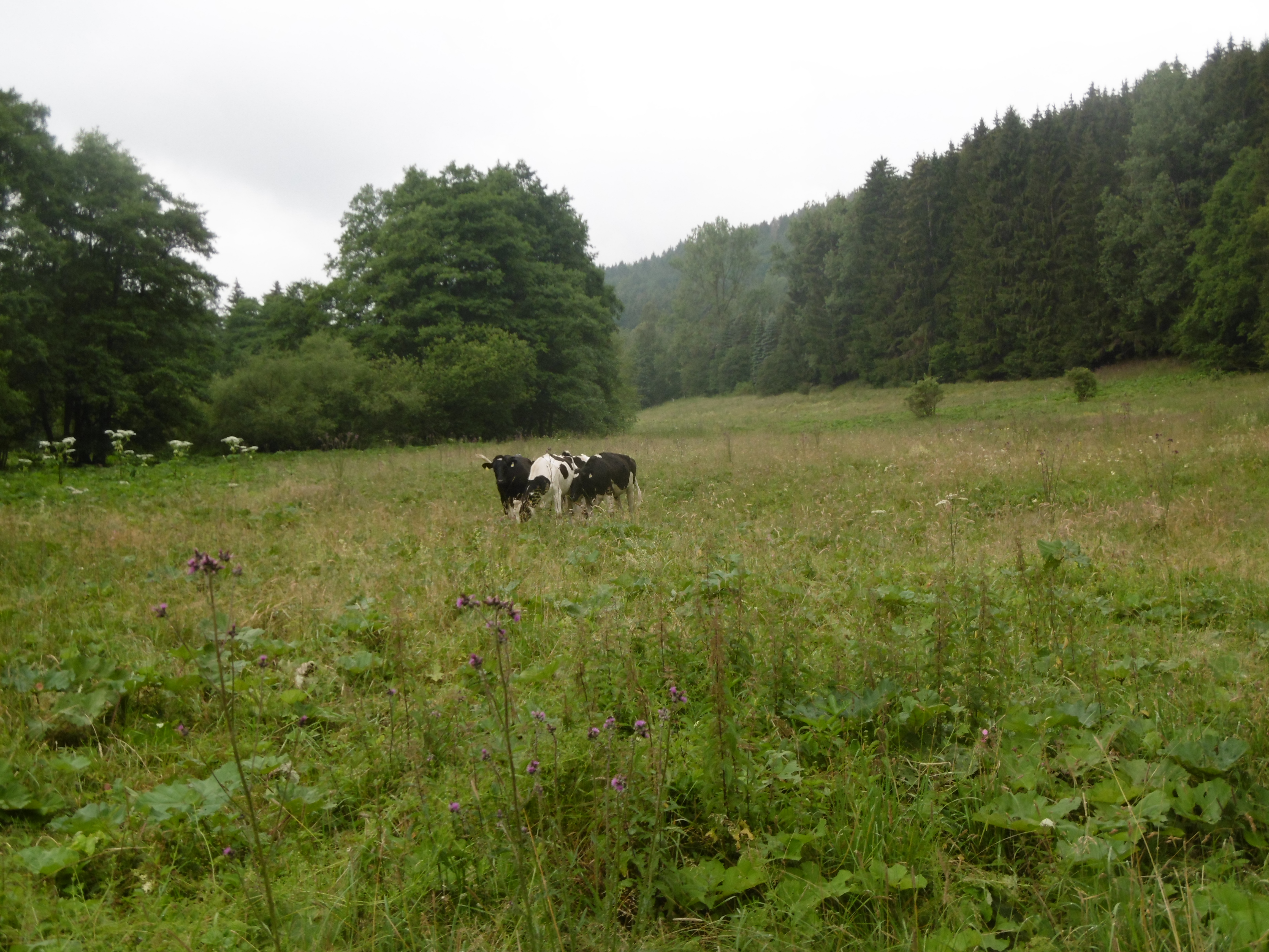 Riesenbärenklau im Naturschutzgebiet Mittleres Hoppecketal​ östlich Alte Hütte.